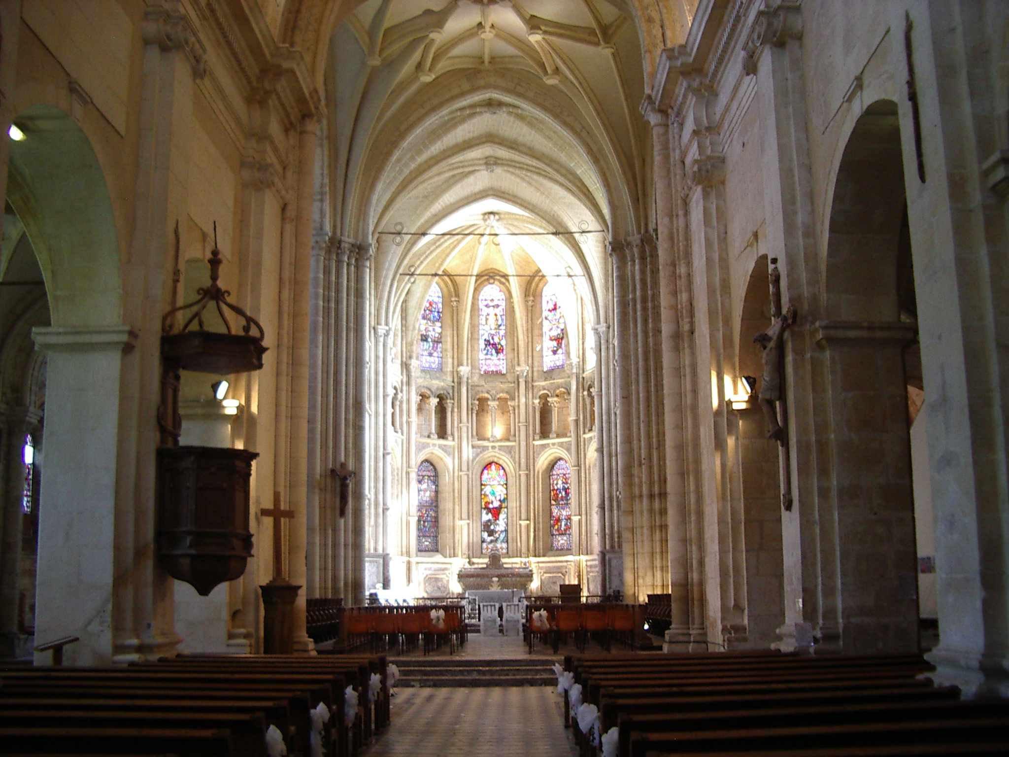 Abbaye saint Michel Aisne le Choeur